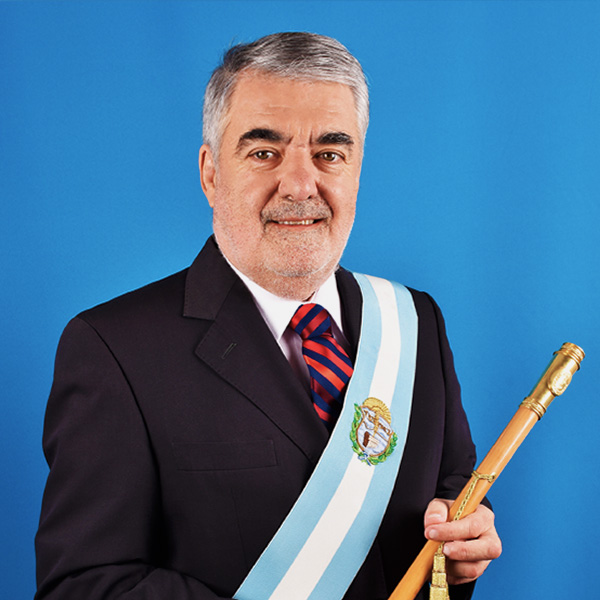 Mario Das Neves, retrato oficial